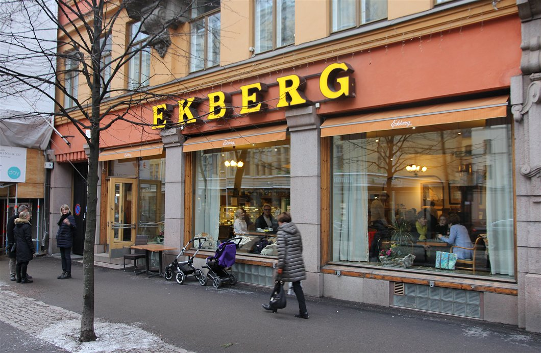 Ekbergin kahvila on vuonna 1852 perustettu, Helsingin kuuluisimpiin kahvipaikkoihin lukeutuva kahvila. Nykyisellä paikallaan Bulevardi 9:ssä se on toiminut vuodesta 1915.